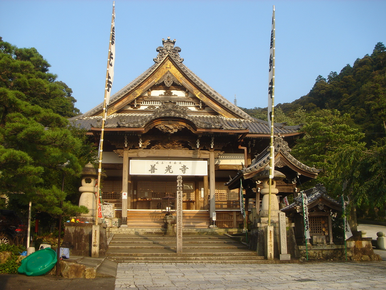 Zenkoji(Temple) in Gifu(善光寺 (岐阜市)),Gifu,Gifu,Japan(岐阜県岐阜市)で撮影